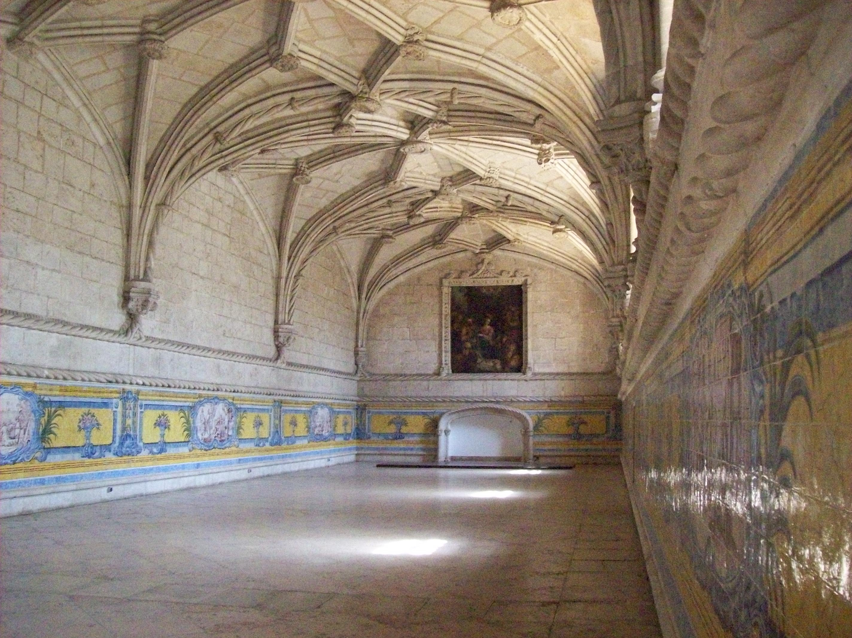 refettorio del Mosteiro dos Jeronimos, Belem, Lisbona